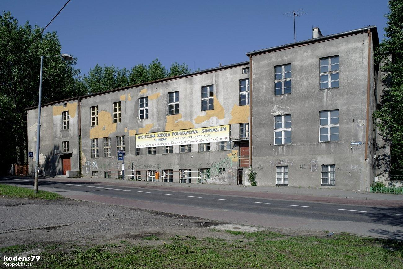 Społeczne Przedszkole, Szkoła Podstawowa i Gimnazjum. Budynek w trakcie wyburzenia .